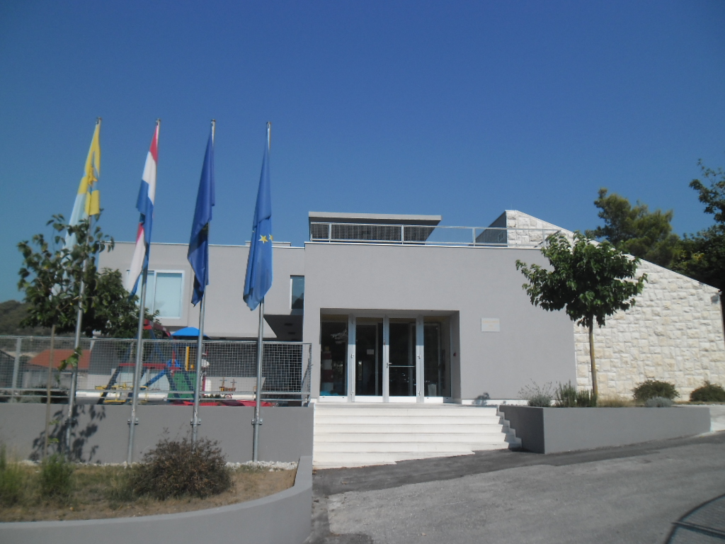 grad Vis